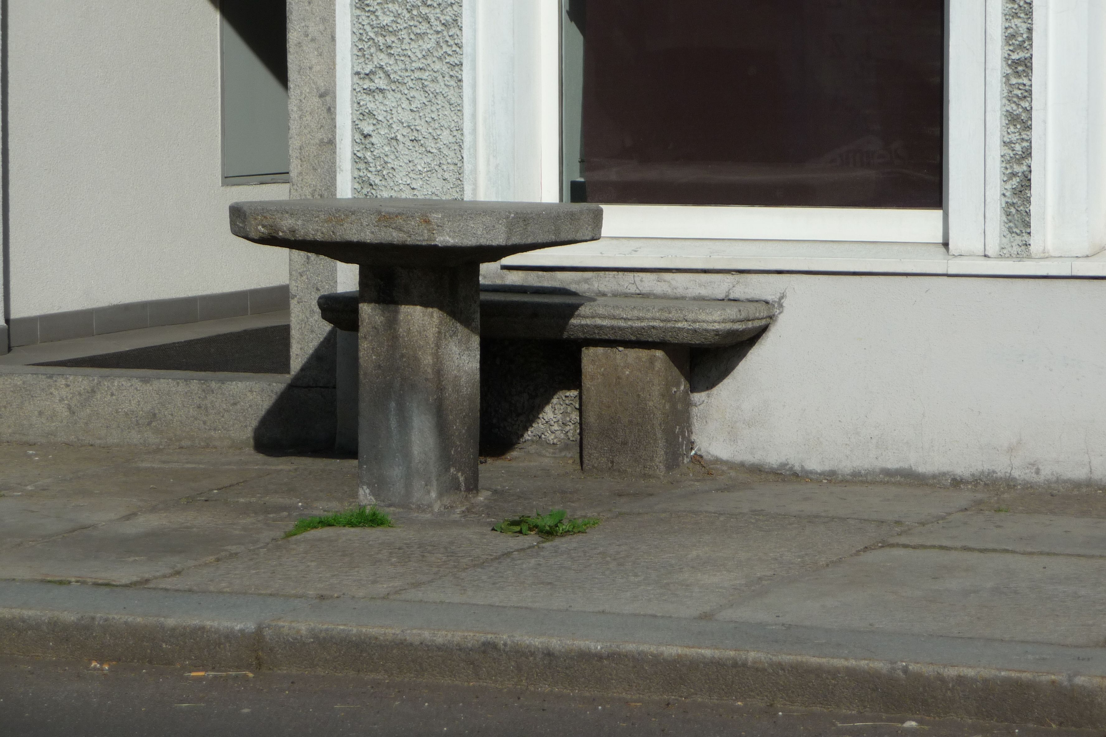 Steintische für Markt - Rohrbach in OÖ